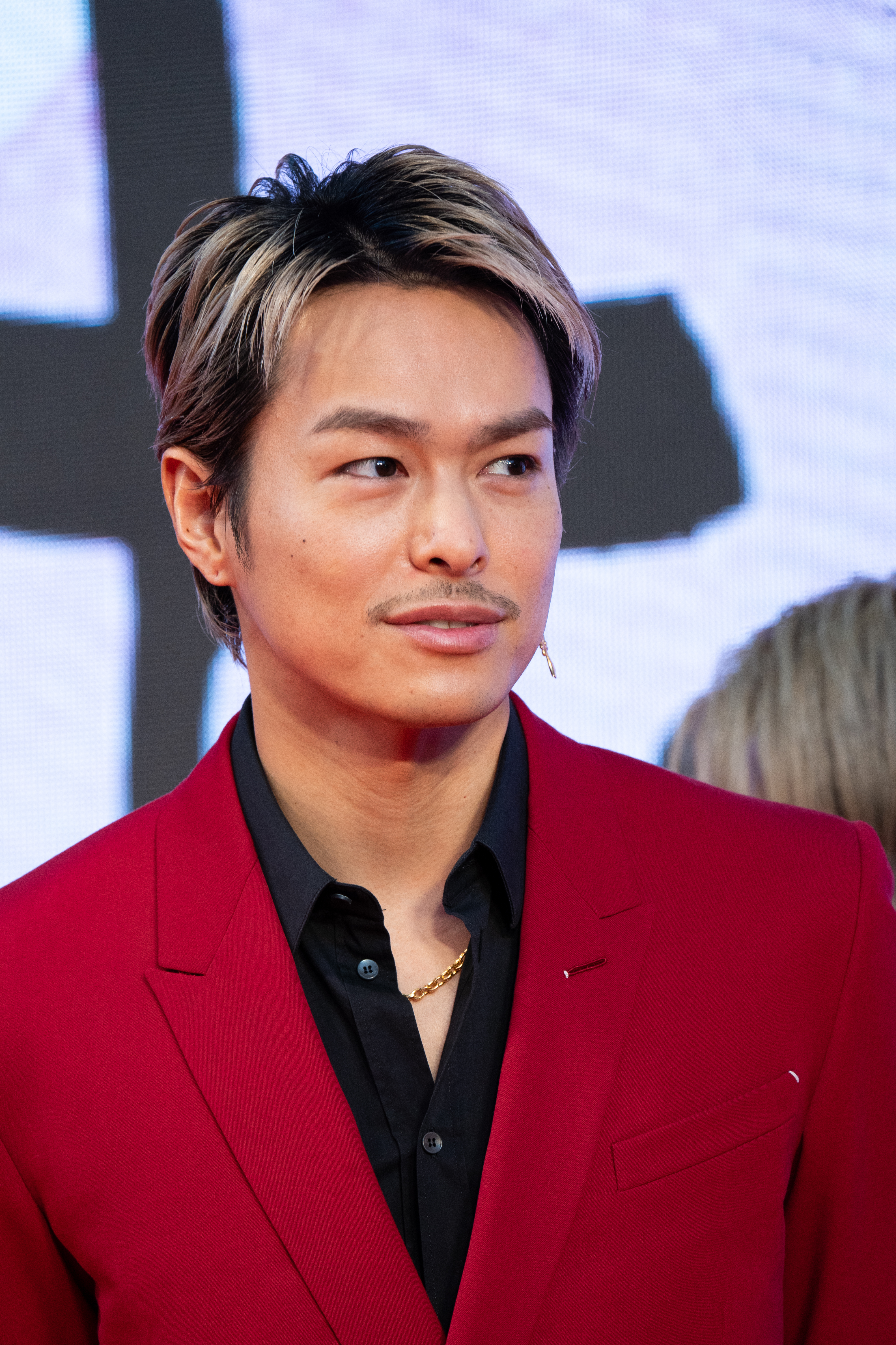 第32回 東京国際映画祭 オープニングセレモニー 今市隆二 (その瞬間、僕は泣きたくなった)